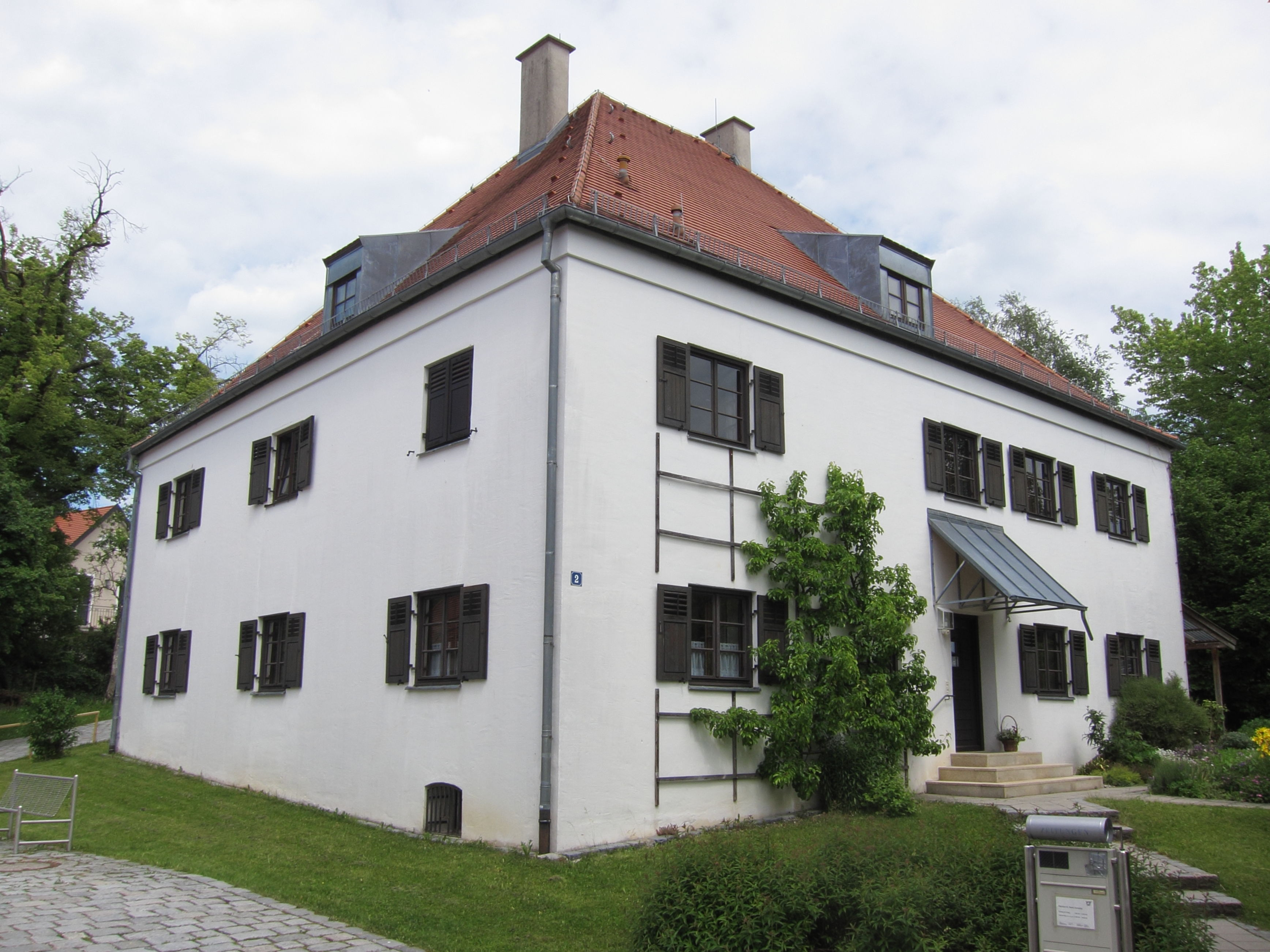 Ingelsberger Weg 2; Pfarrhaus, zweigeschossig, mit Walmdach, 1802 erbaut.